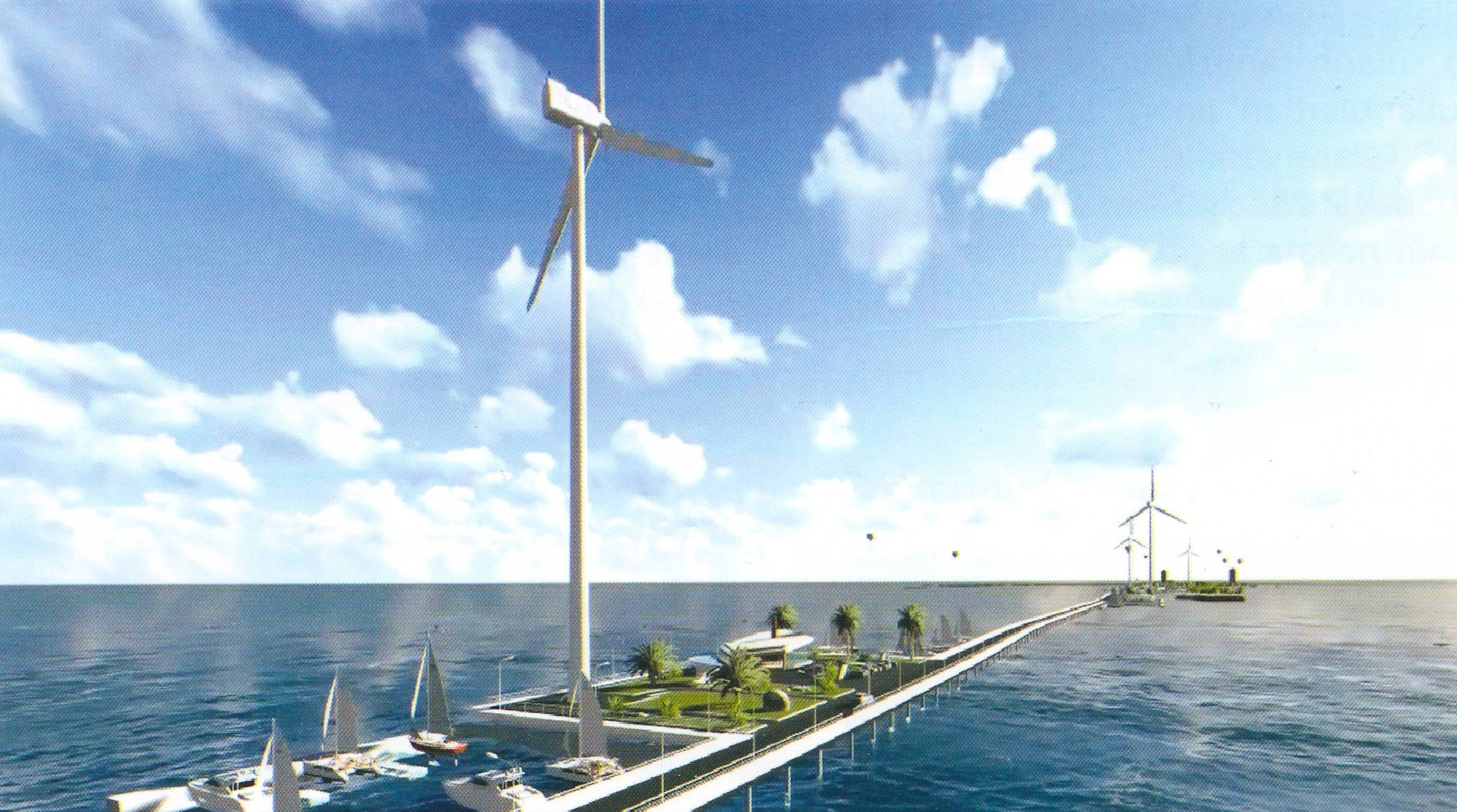 Külək adası